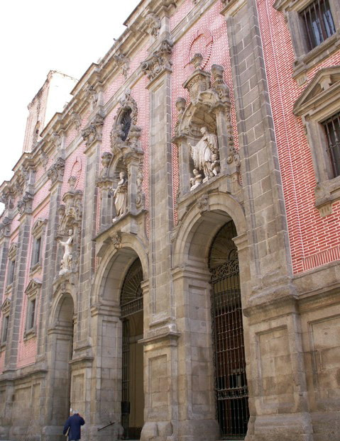 Iglesia de San Cayetano. C/ Embajadores (Madrid). En la realización de la primera iglesia intervinieron arquitectos de la talla de J.B. Churriguera y Pedro Ribera. Construida entre 1664 y 1761. Un incencio en 1936 solo respetó la fachada.